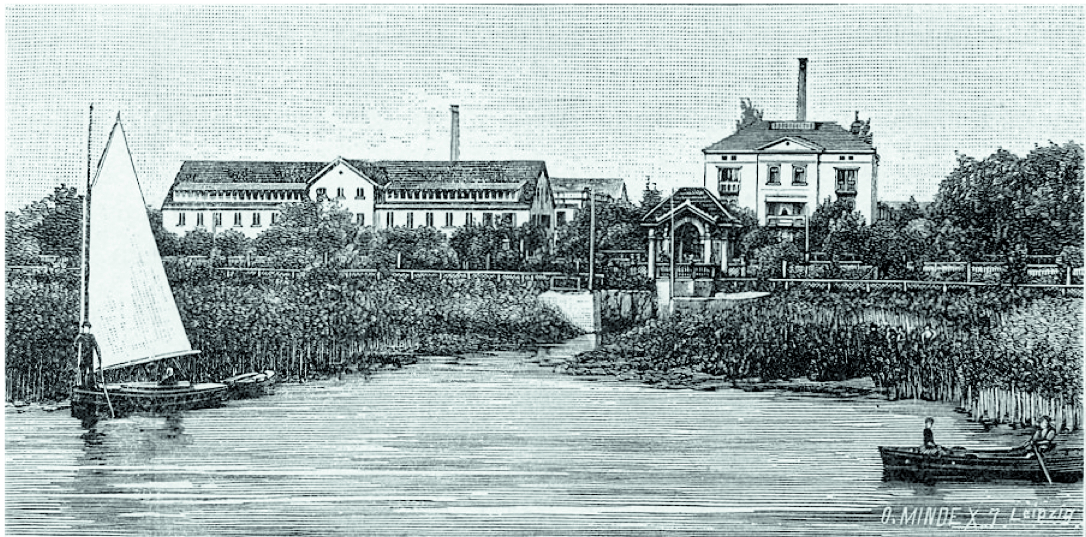 Bild, dass das Hüni-Anwesen im Jahr 1889 vom See aus zeigt.